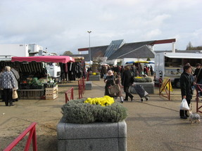 Marché de Béraire à La Chapelle S-Mesmin